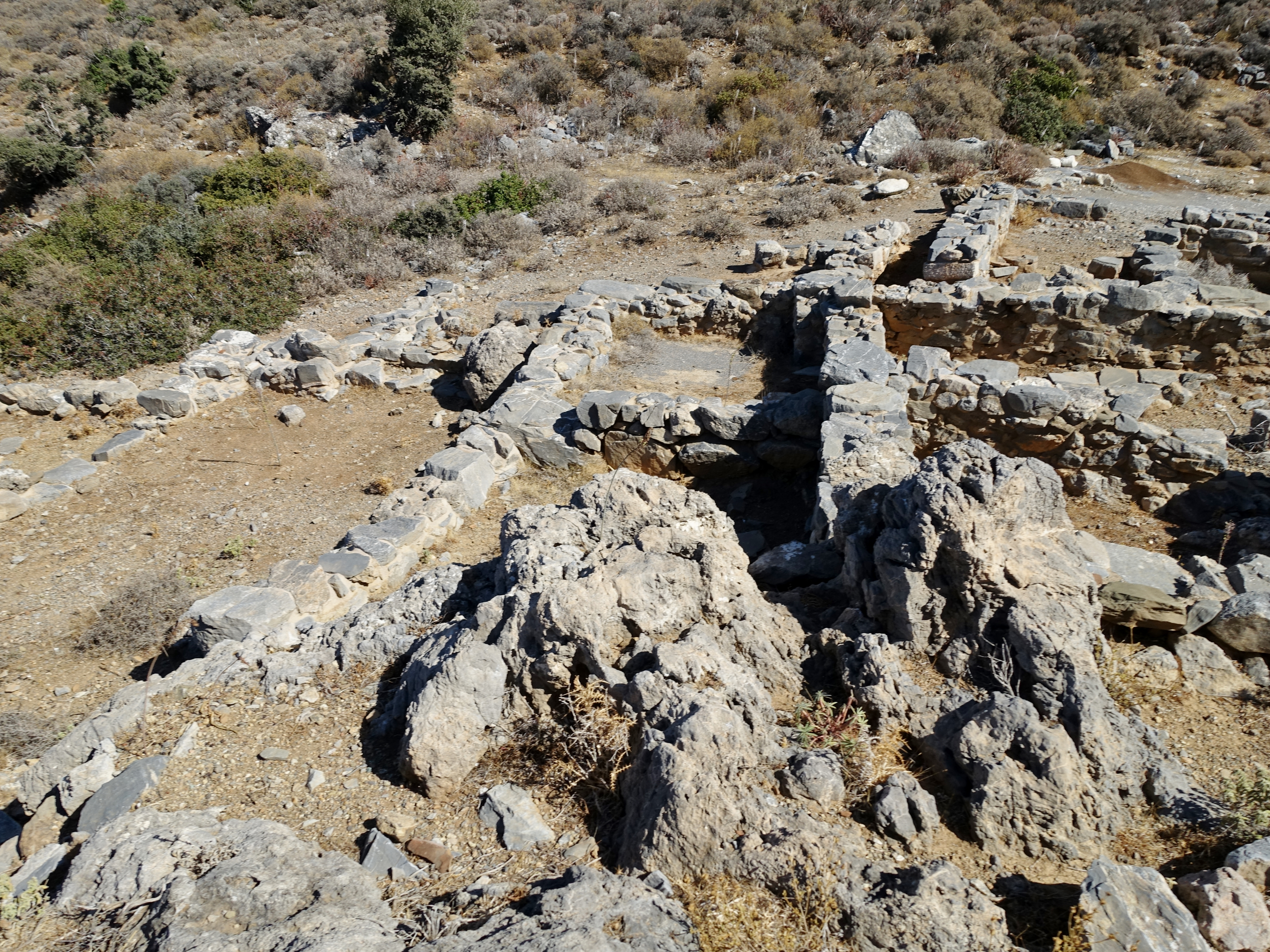 Ausgrabungsstätte von Chalasmenos (Χαλασμένος) bei Monastiraki, Kreta, Griechenland